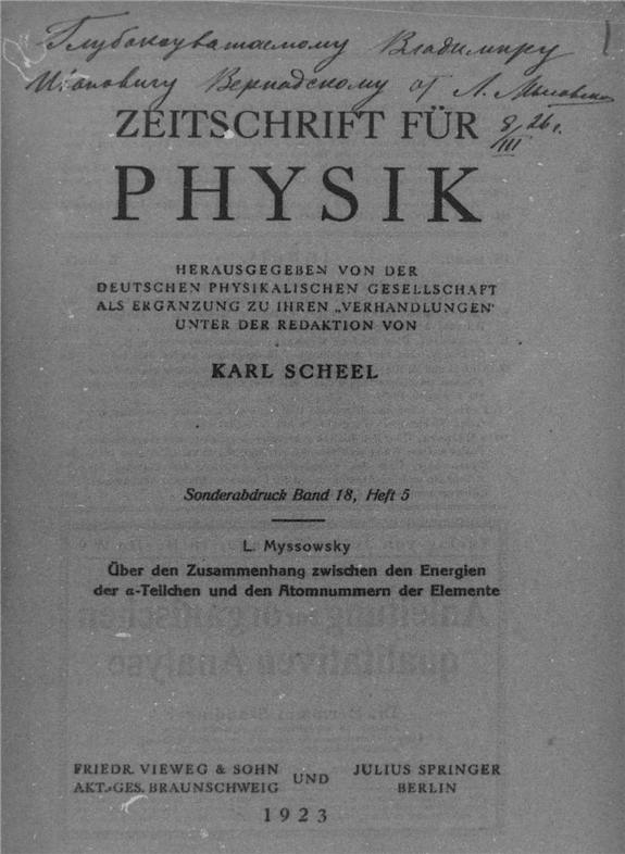 Оттиски статей из "Zeit schrift fur physik" с автографами Вернадскому